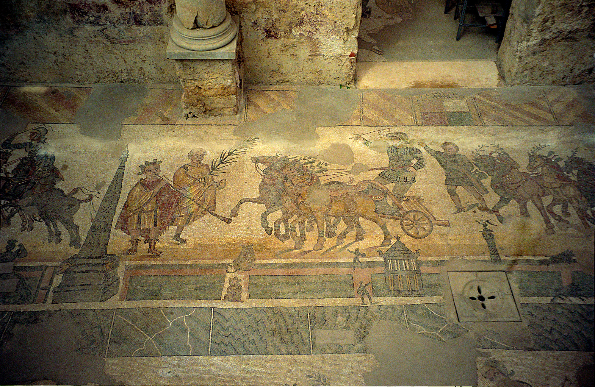 Sicily, Villa Romana del Casale, mozaika "Pochód triumfalny